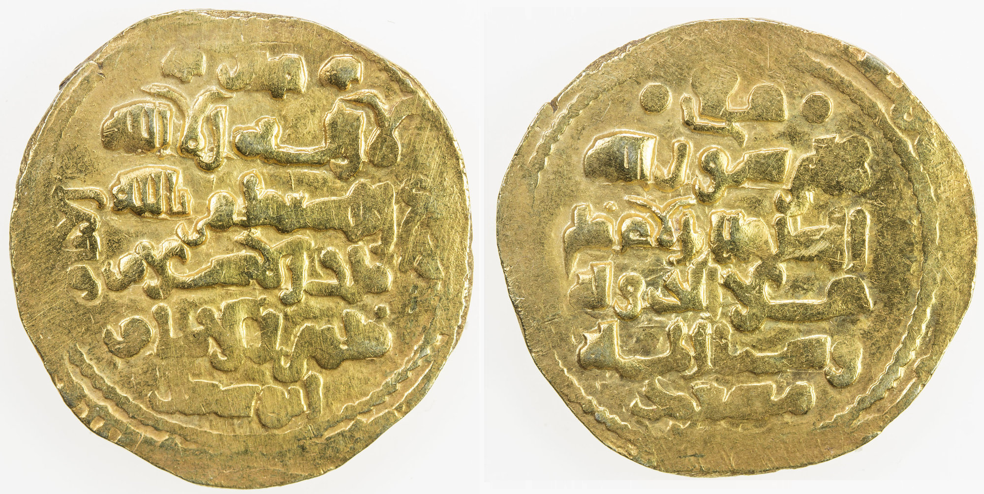 سکه یک دیناری مسعود سوم